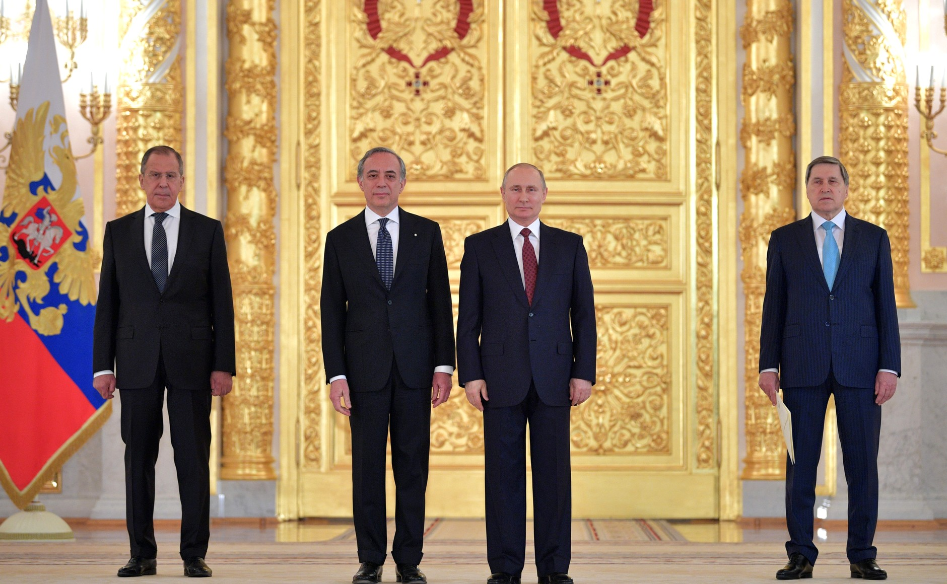 В Александровском зале Большого Кремлёвского дворца Владимир Путин принял верительные грамоты у послов ряда иностранных государств. На церемонии вручения верительных грамот. С Чрезвычайным и Полномочным Послом Итальянской Республики в Российской Федерации Паскуале Терраччано.